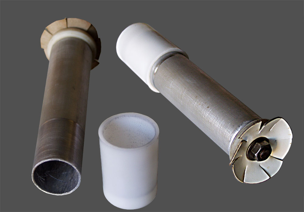 Pouzdra pro zásilky pražské potrubní pošty Hornjoserbsce: Tutón wobraz pokazuje schownje za posyłki Praskeho rołoweho pósta